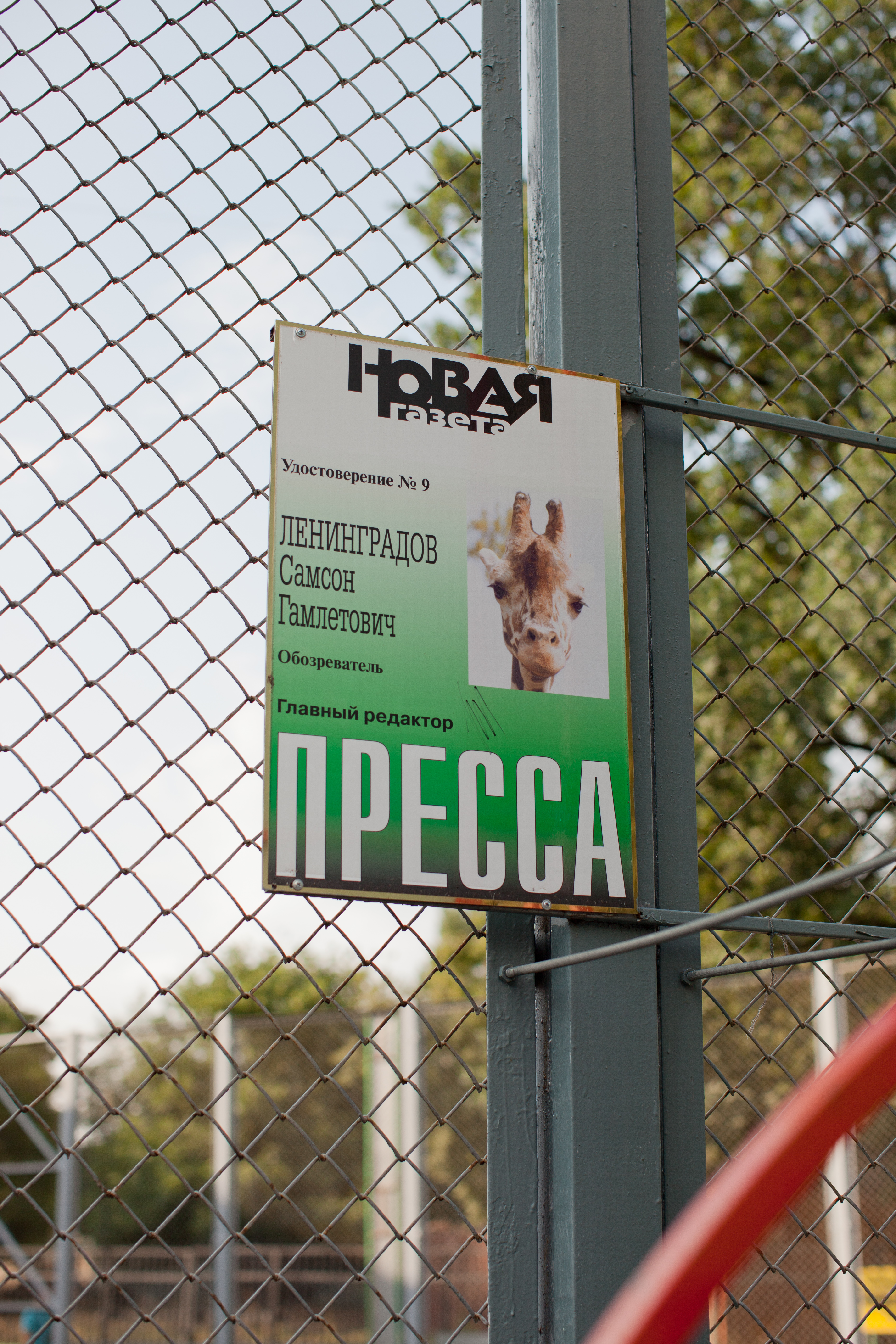 Удостоверение Самсона Гамлетовича Ленинградова, "обозревателя" "Новой газеты"